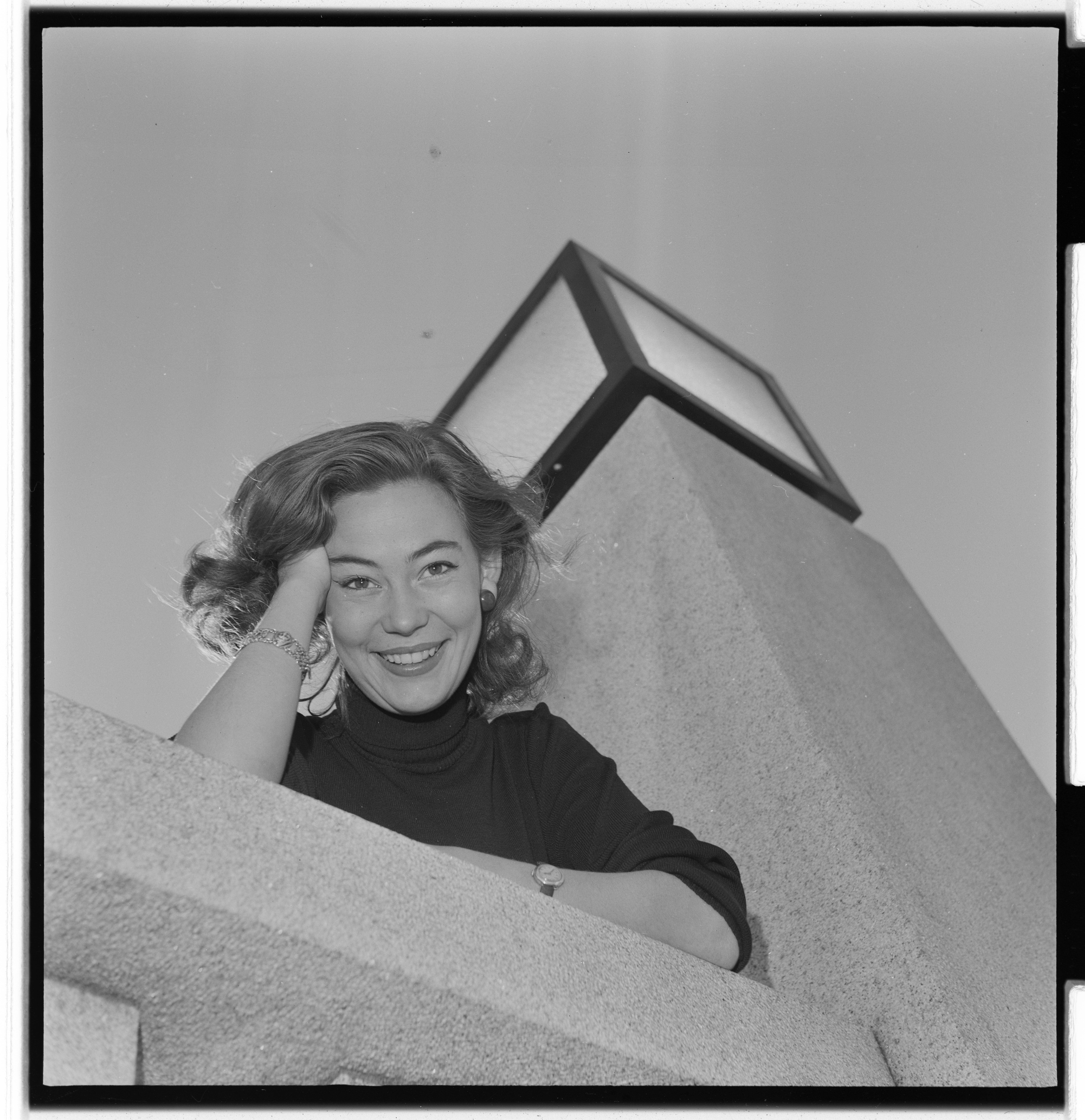 Bildet er hentet fra Arkivverket. Anne-Lise Tangstad Arkivinstitusjon : Riksarkivet Arkivnavn : Billedbladet NÅ Sted : Norge, Ukjent, Ukjent, Ukjent Emneord: danser, kvinner Avbildet: Tangstad, Anne-Lise